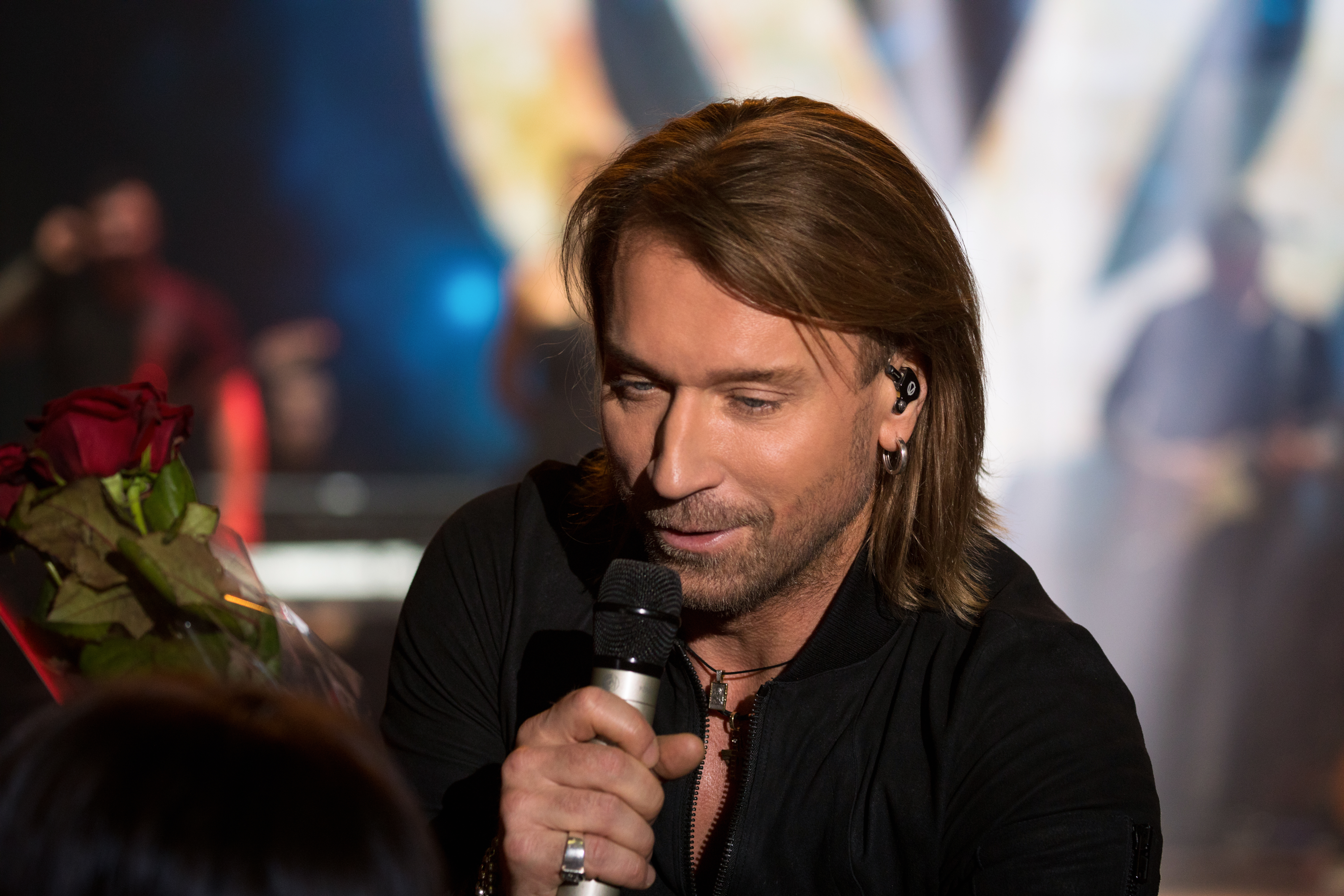 Олег Винник — украинский певец, композитор и автор песен.